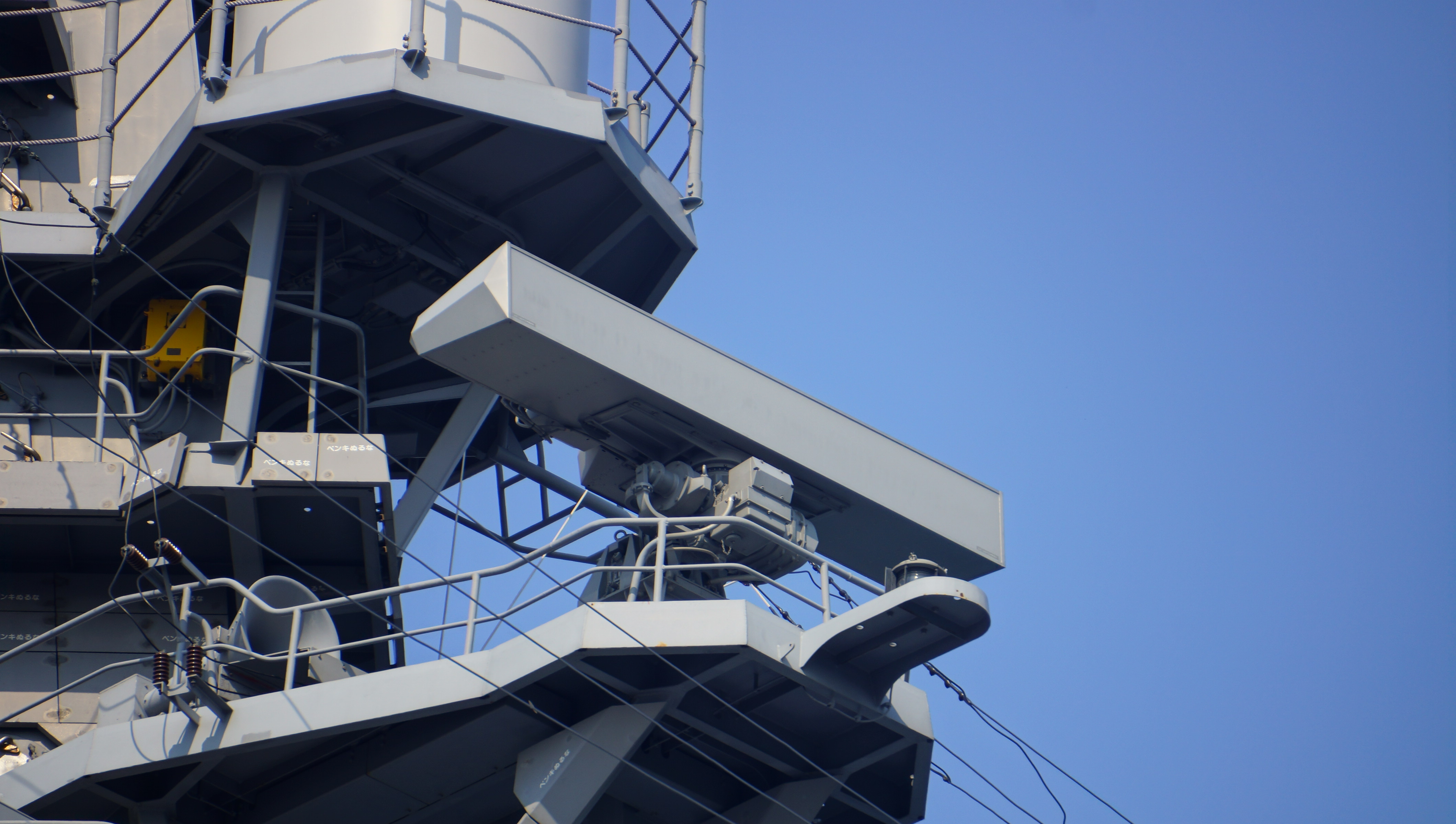 海上自衛隊 護衛艦あたご（DDG-177） OPS-28Eレーダー。 14年4月26日 天保山埠頭にて。